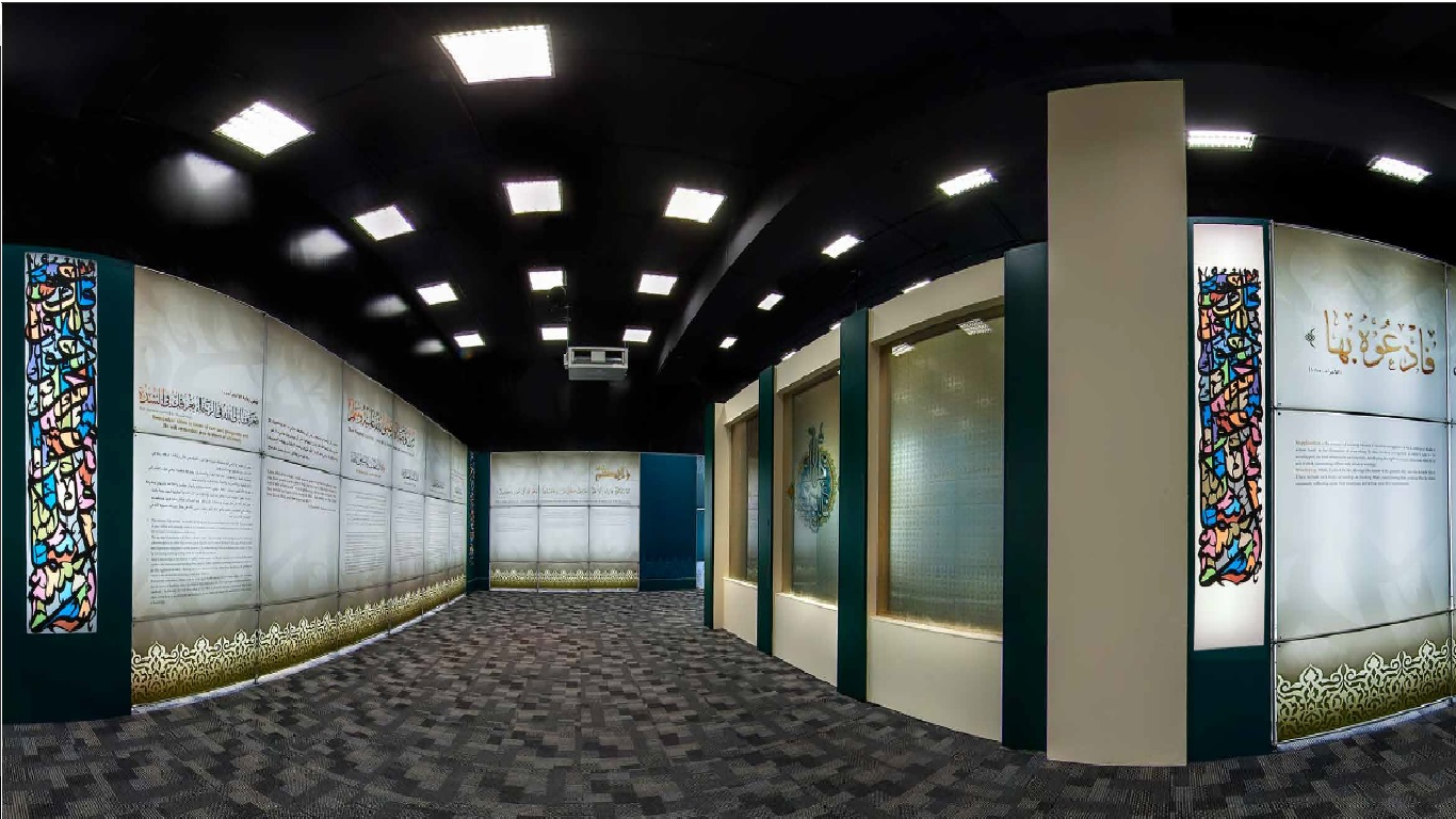 قاعة الوداع في معرض أسماء الله الحسنى بالمدينة المنورة